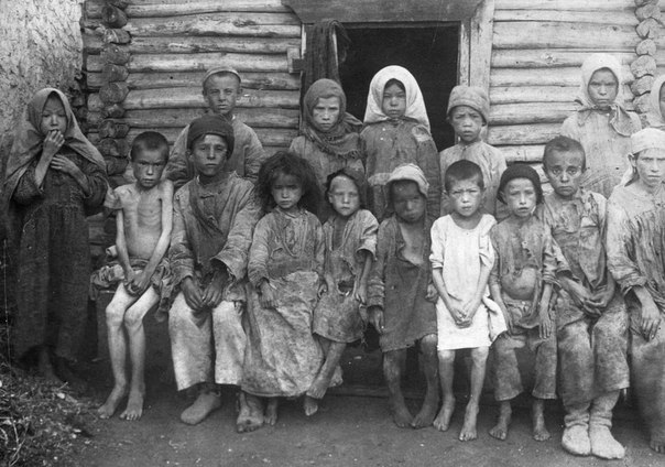 Голодные дети в Башкирской АССР